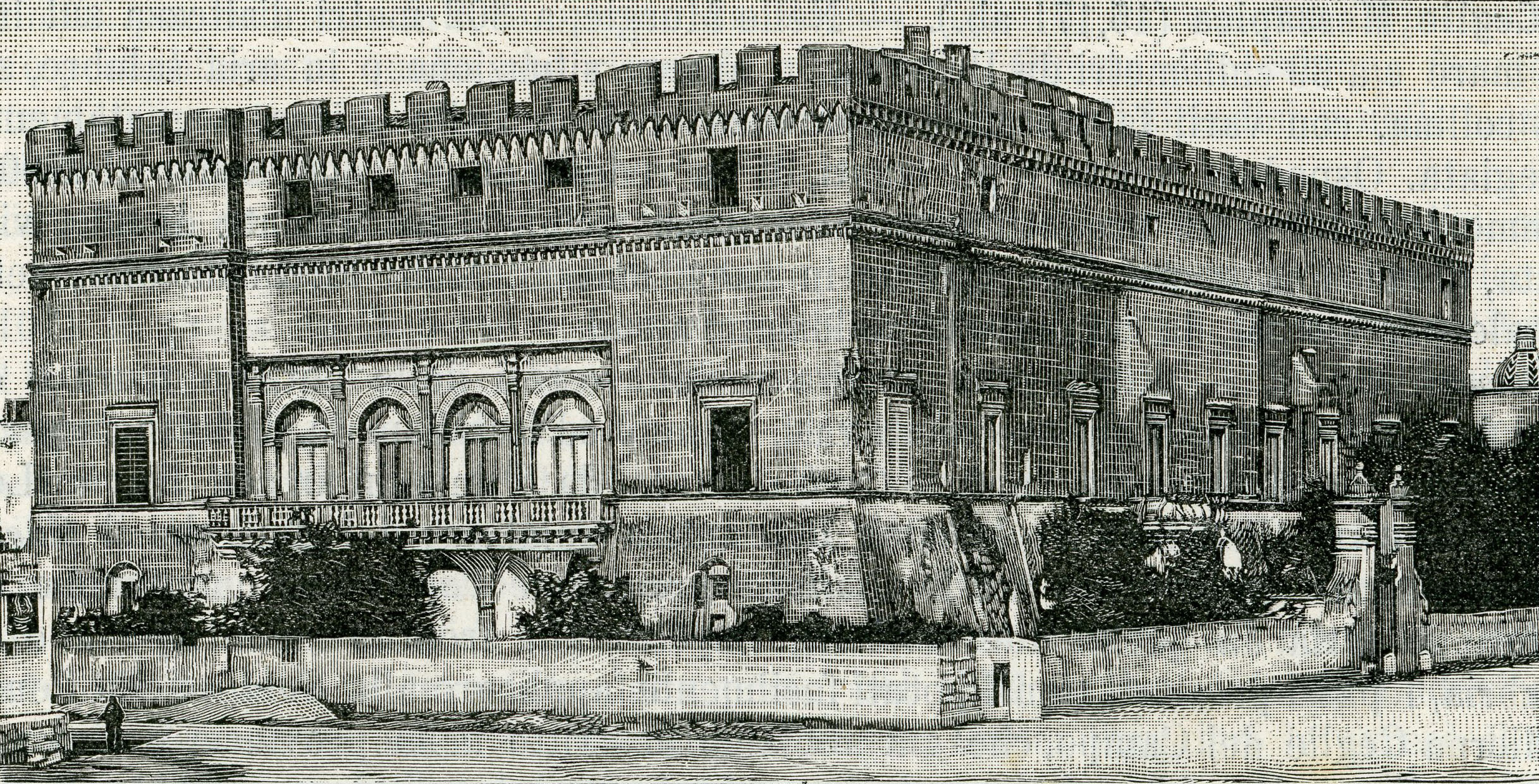 Francavilla Fontana: castello degli imperiali, (xilografia).